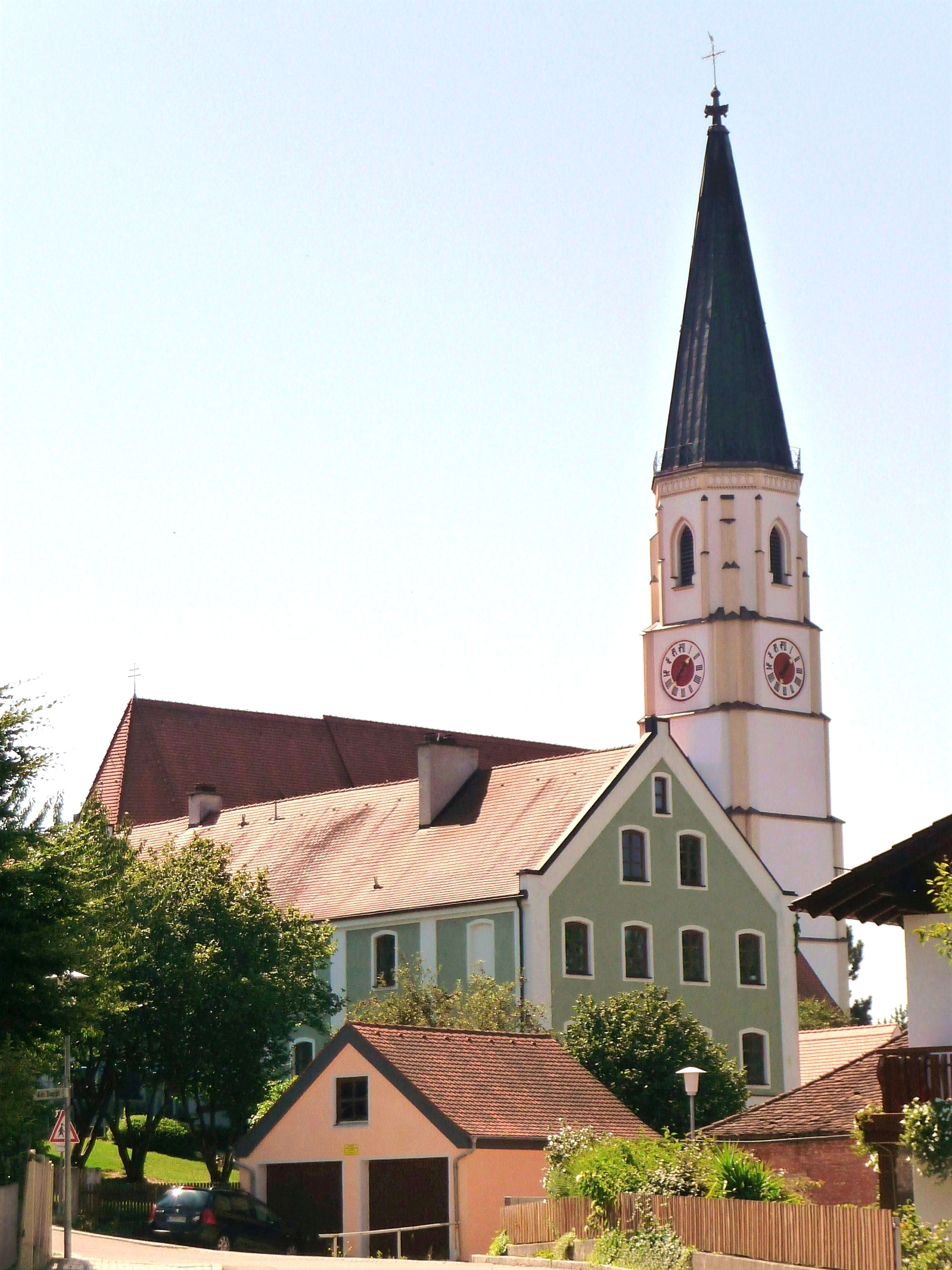 Die Pfarrkirche St. Peter in Velden an der Vils